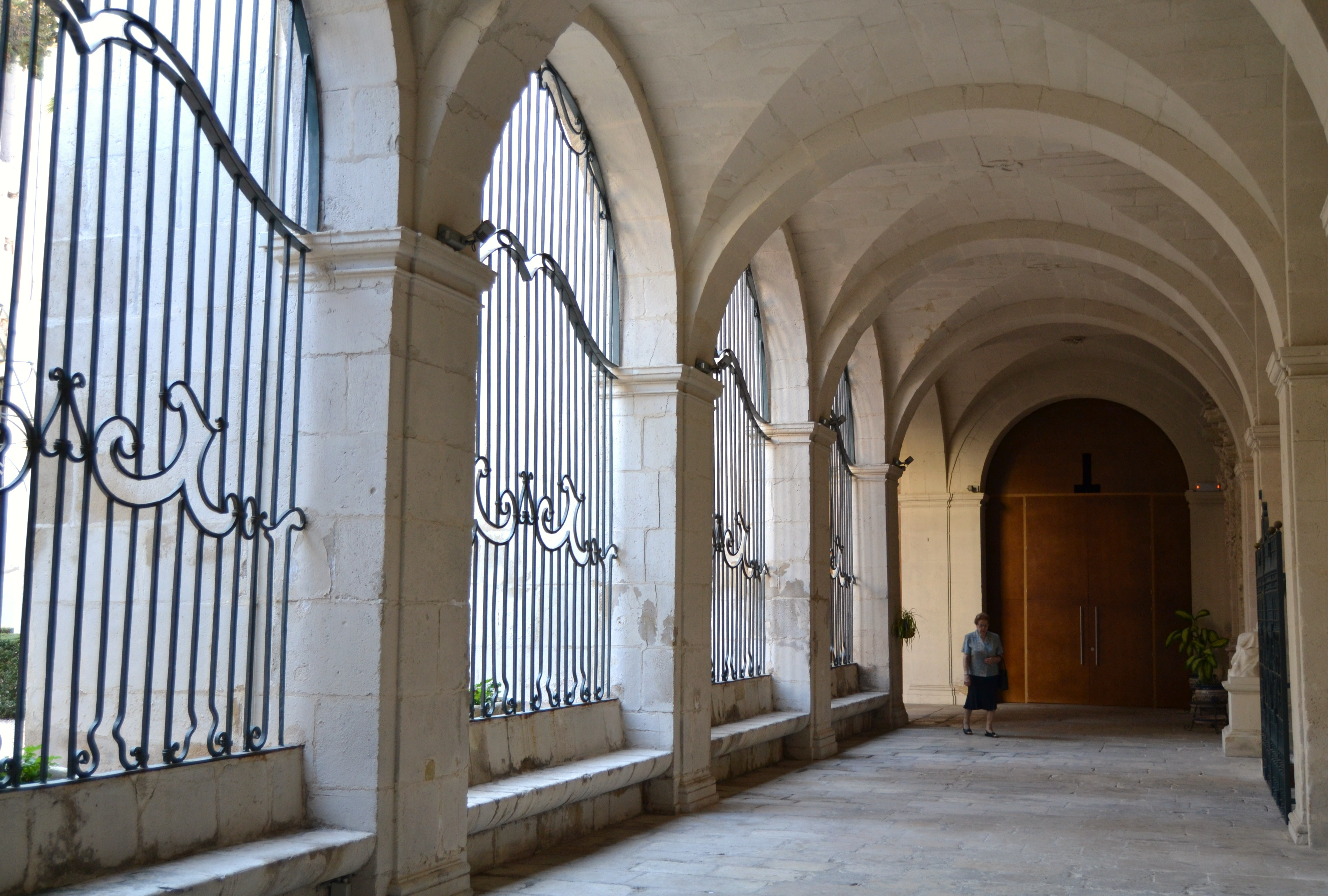 Claustre de la cocatedral de sant Nicolau d'Alacant, l'Alacantí.